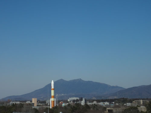 つくば市中心部（中央公園と筑波山）